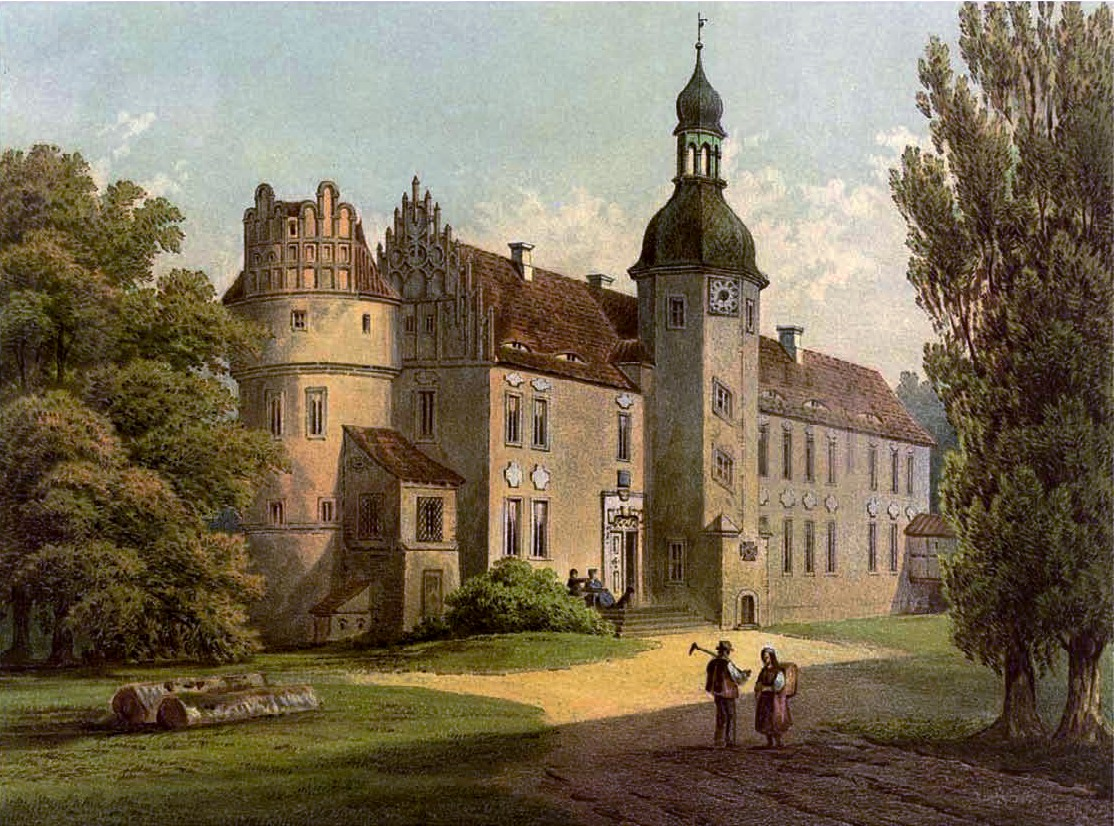 Schloss Neudeck, Lithografie aus dem 19. Jahrhundert